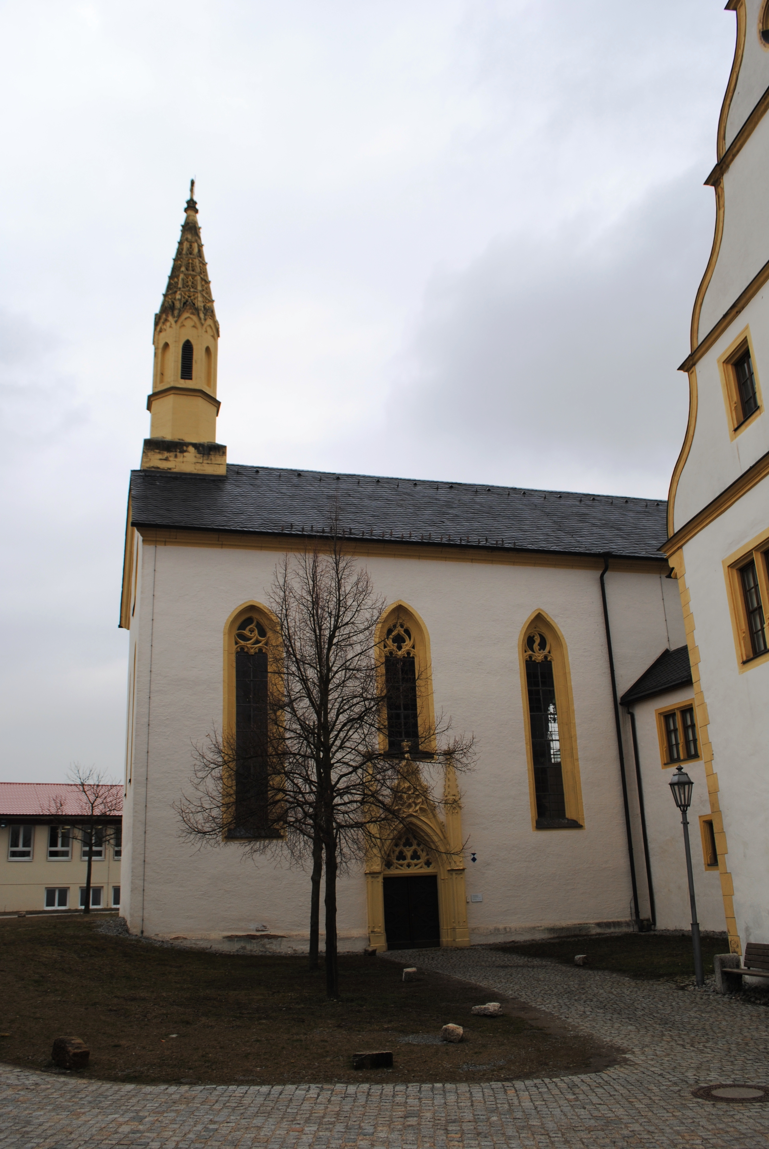 Konventskirche, Kartause Astheim, Volkach, einschiffige Anlage mit Lettner zwischen Chor und Laienraum, 1603-09, barockisiert 1723